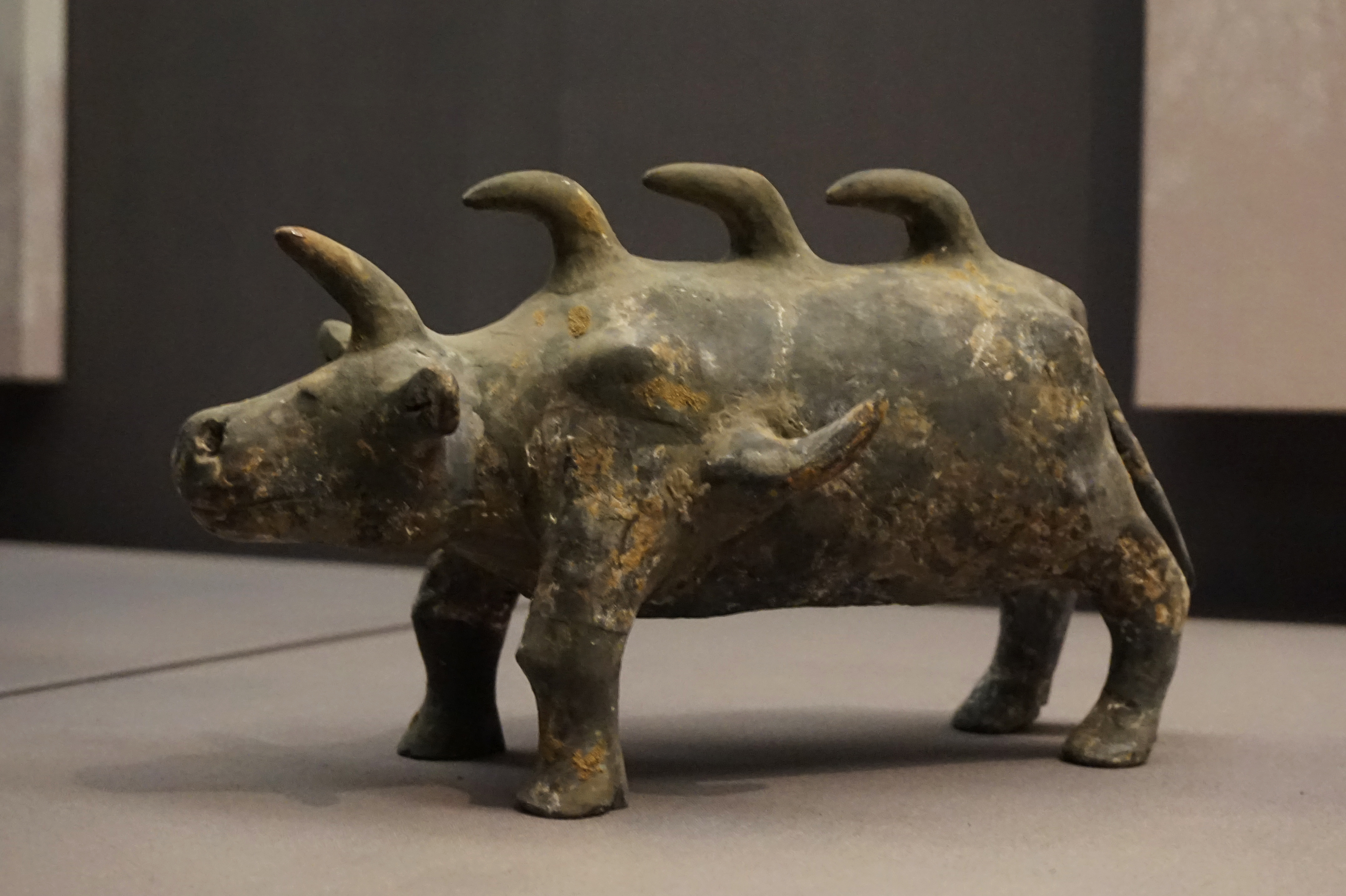 南朝石镇墓兽。南京灵山出土。